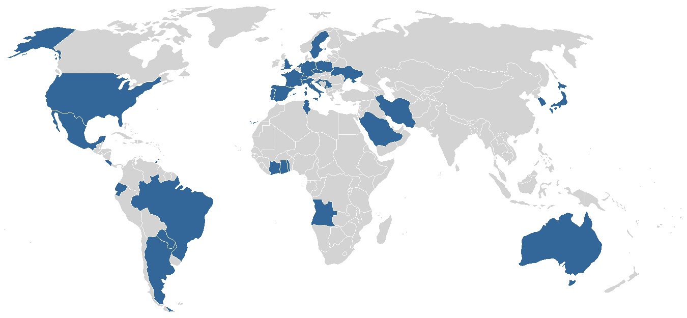 Shows teams of FIFA Fußball-Weltmeisterschaft Deutschland 2006 on a world map